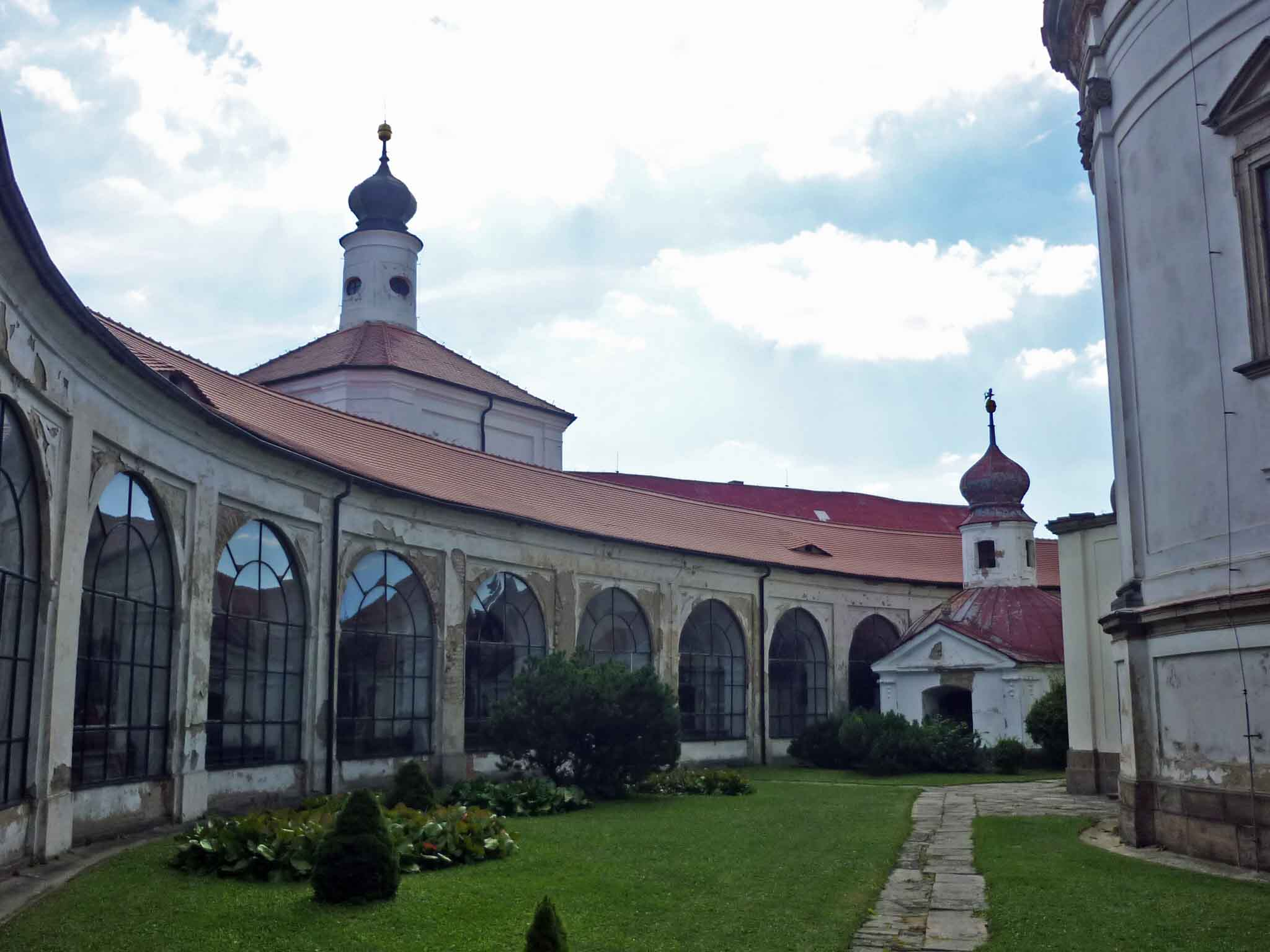 Kreuzgang der Basilika in Mariaschein (Bohosudov)